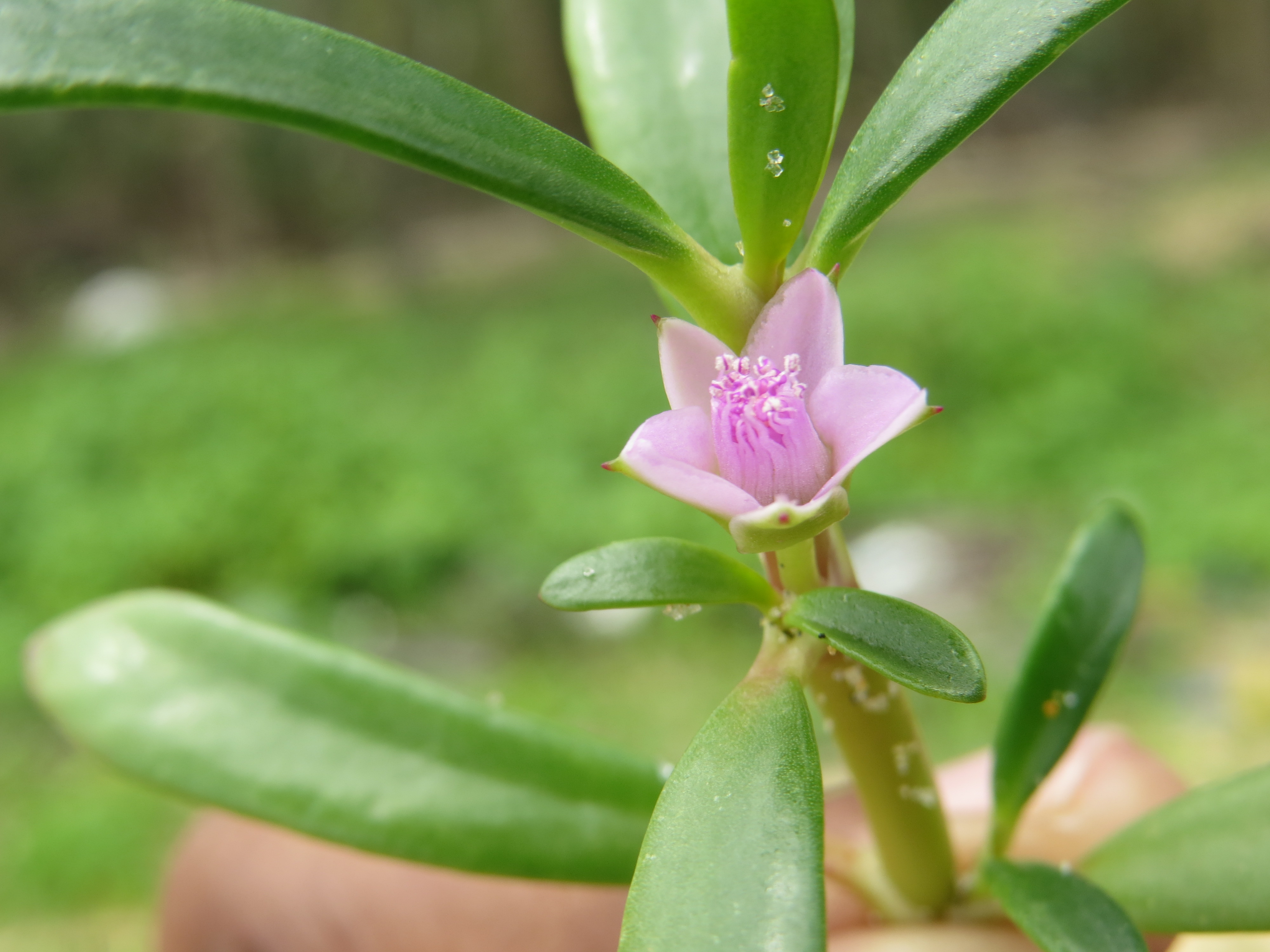 Photos taken at Kavvayi backwaters, Payyannur, Kerala